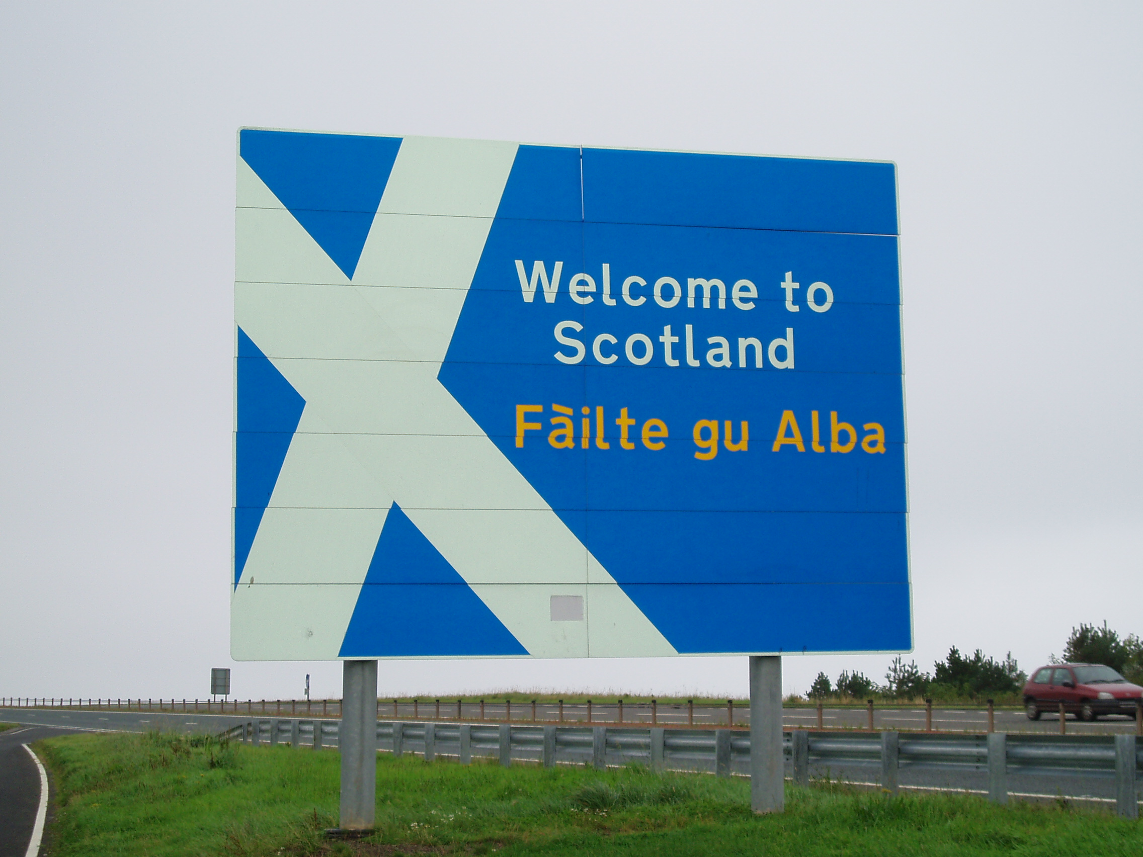 Well, we made it !